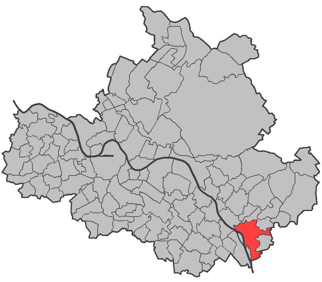 Dresden, Pillnitz